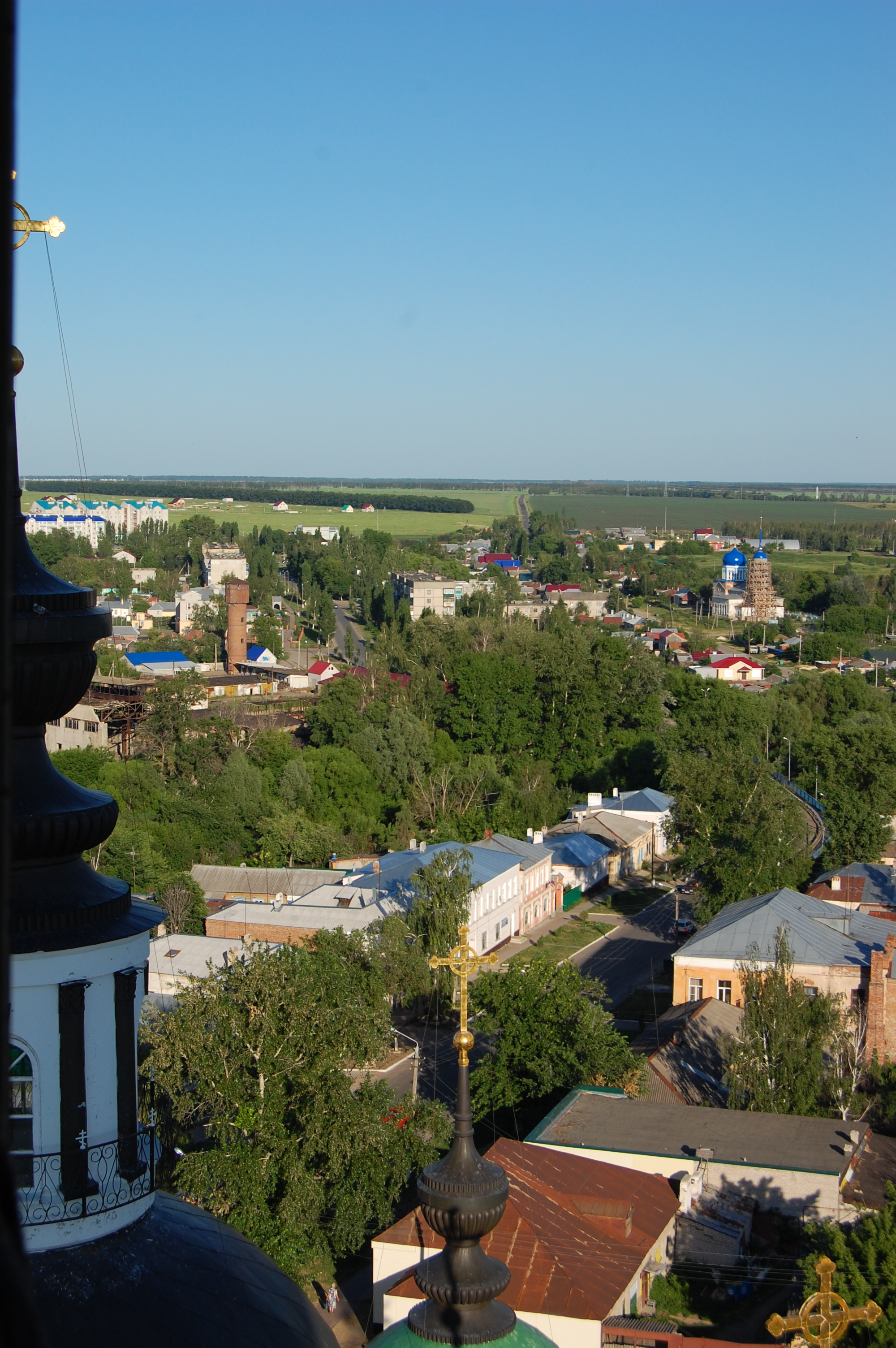 Вид с высоты на район Заречья, Чаплыгин